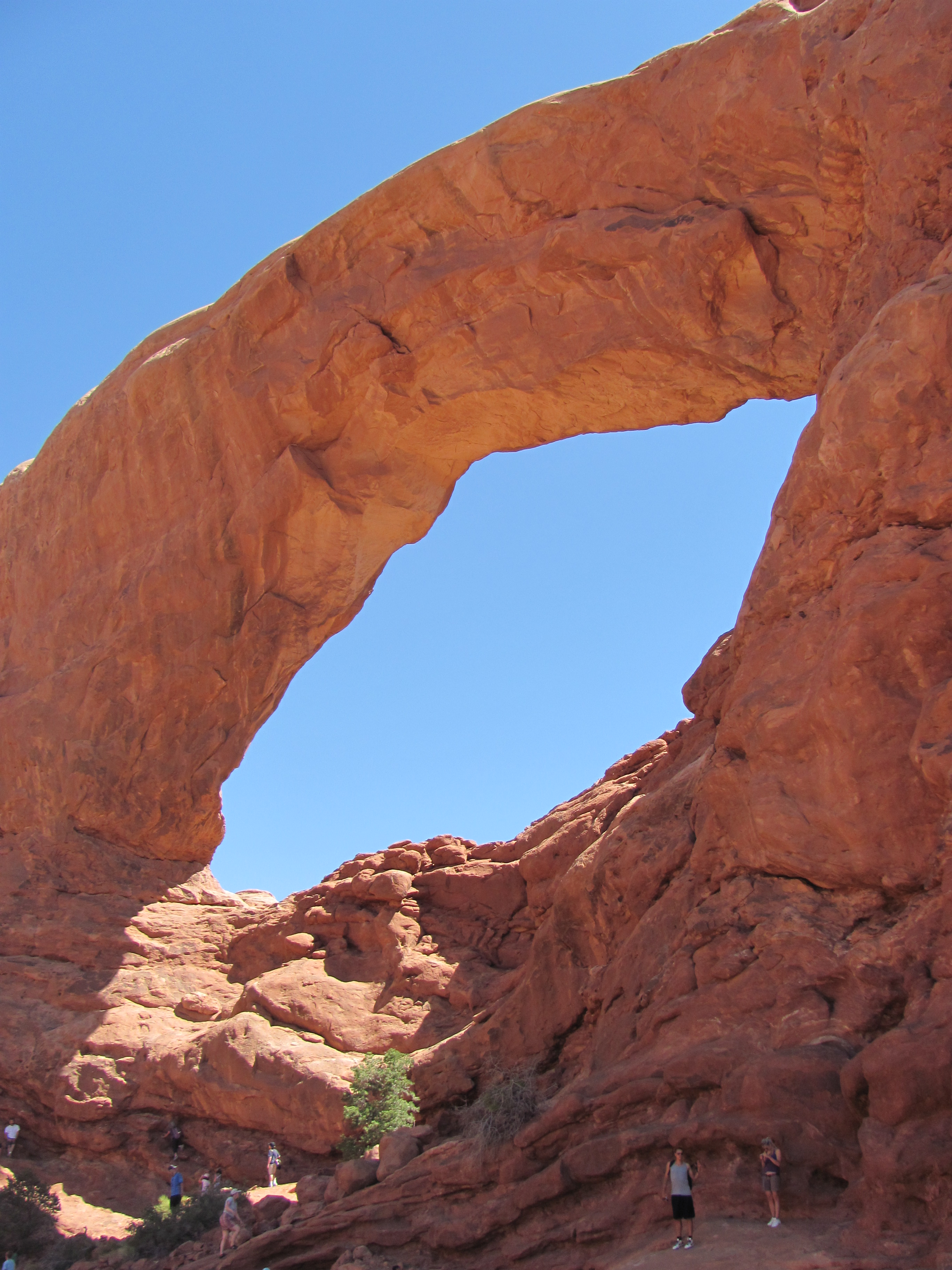 Detailní pohled na pískovcový oblouk